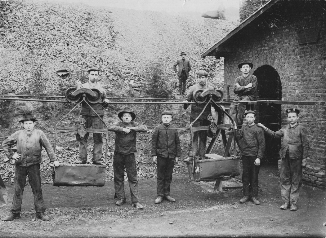 Apfelbaumer Zug Seilbahn